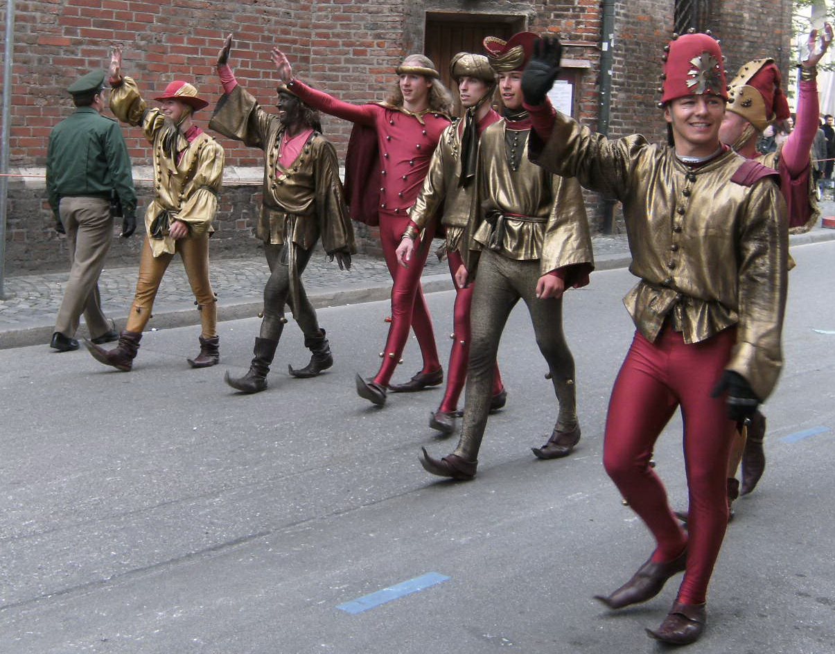 Moriskentänzer beim Trachtenumzug in München.